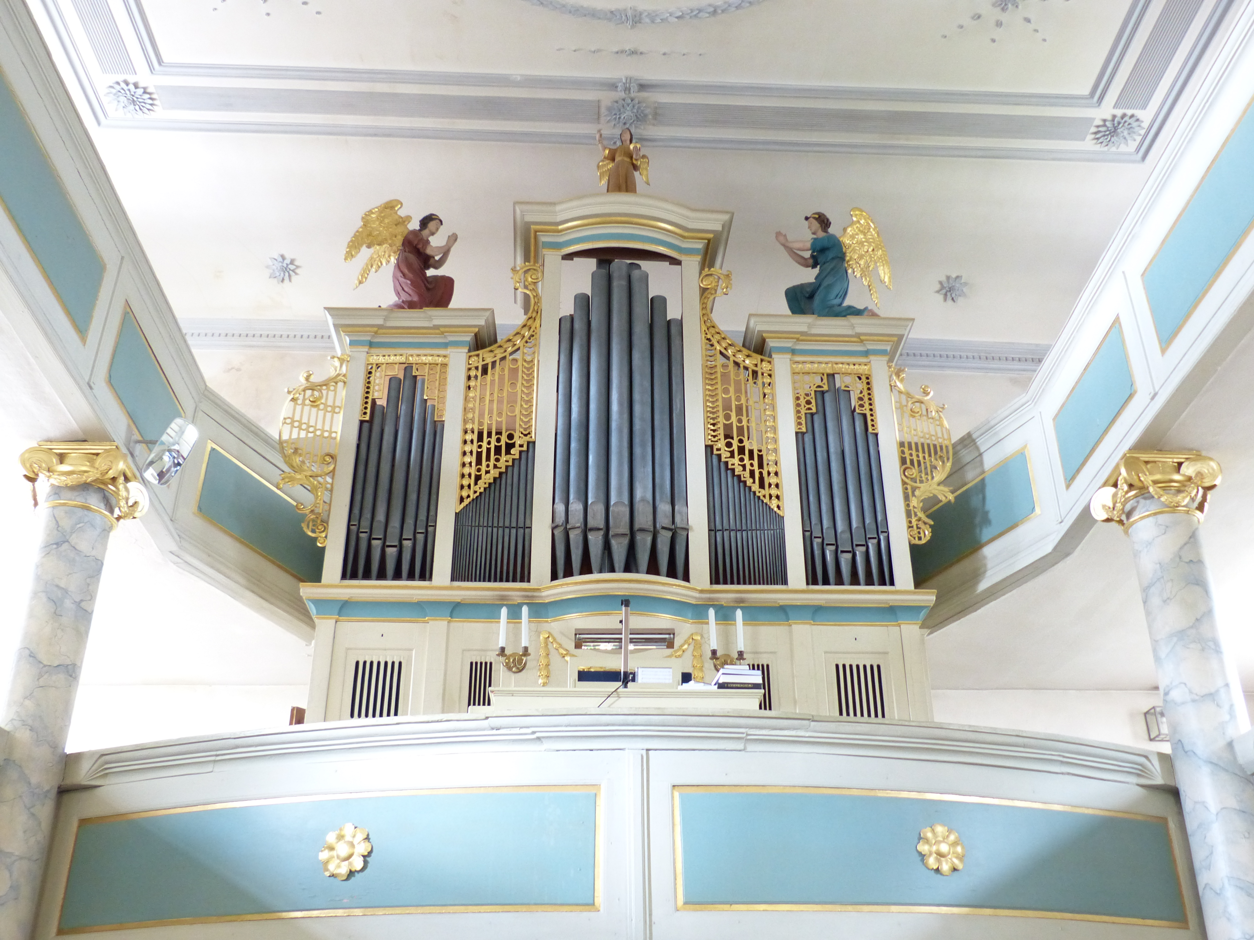 Innenausstattung der Marienkirche